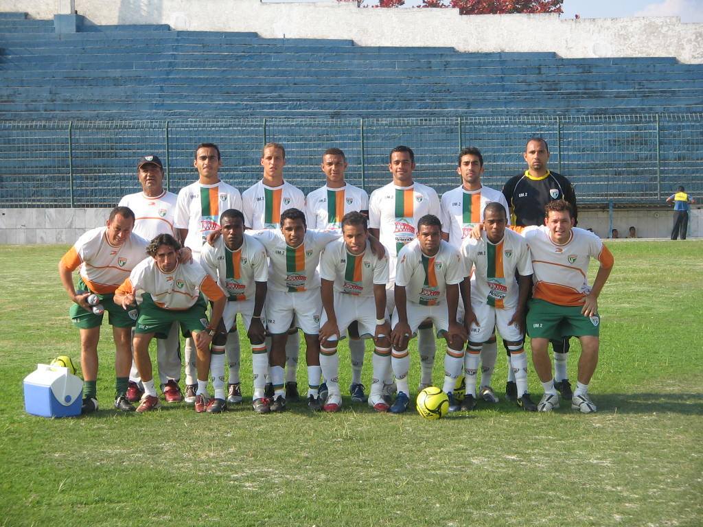 Time profissional do Villa Rio Esporte Clube, em 2007.